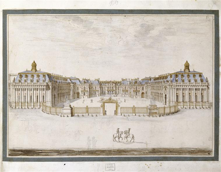 Aquarelle de Israël Sylvestre (1621-1691) reproduisant le château de Versailles, coté Paris avec la Grille royale du château